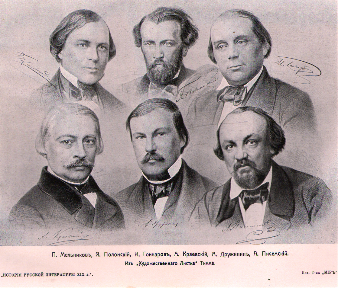 П.И.Мельников, Я.П.Полонский, И.А.Гончаров, А.А.Краевский, А.В.Дружинин, А.Ф.Писемский